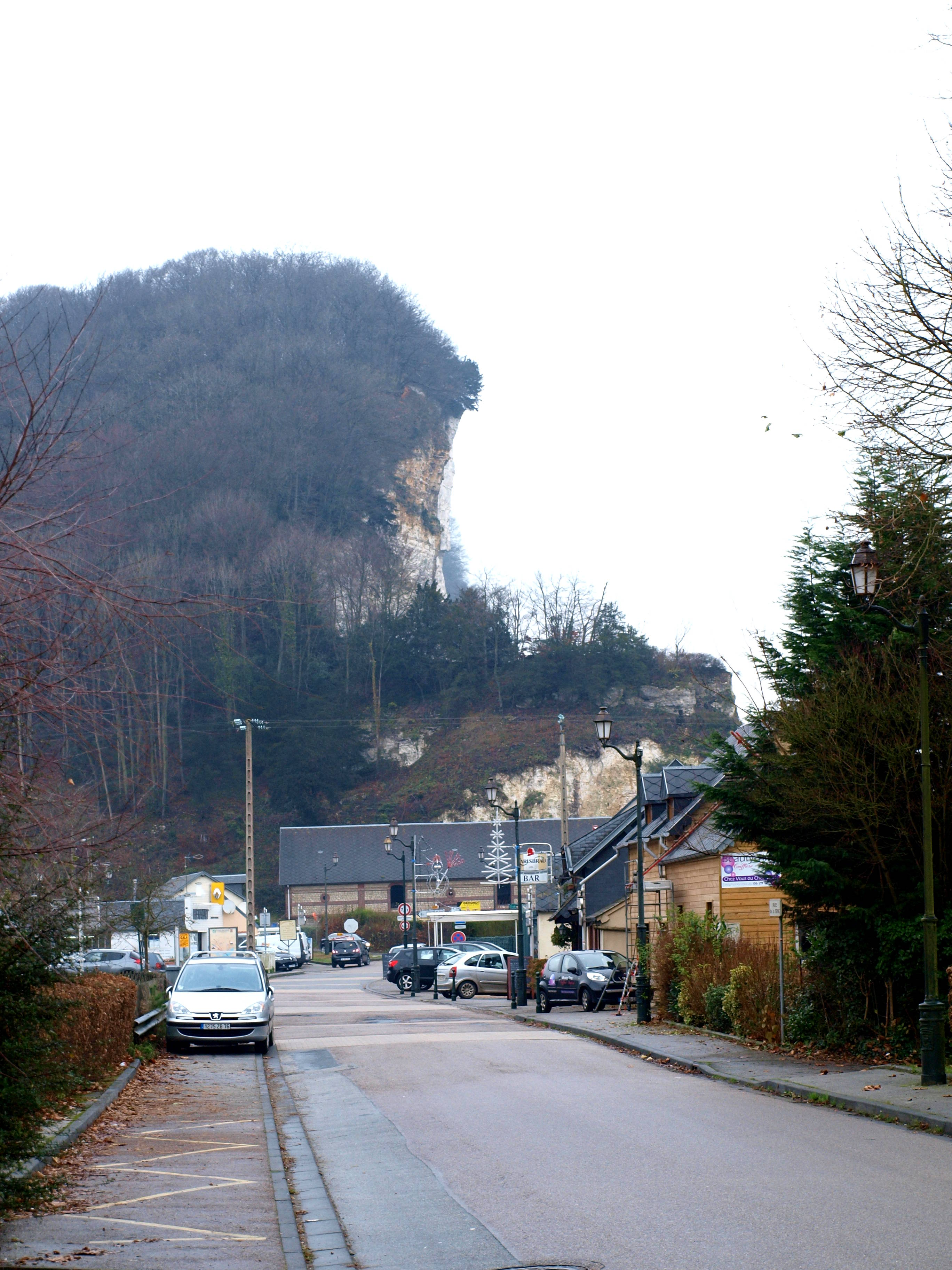 Tancarville (Seine-Maritime, France) ; vue du quartier bas & de l'abrupt.